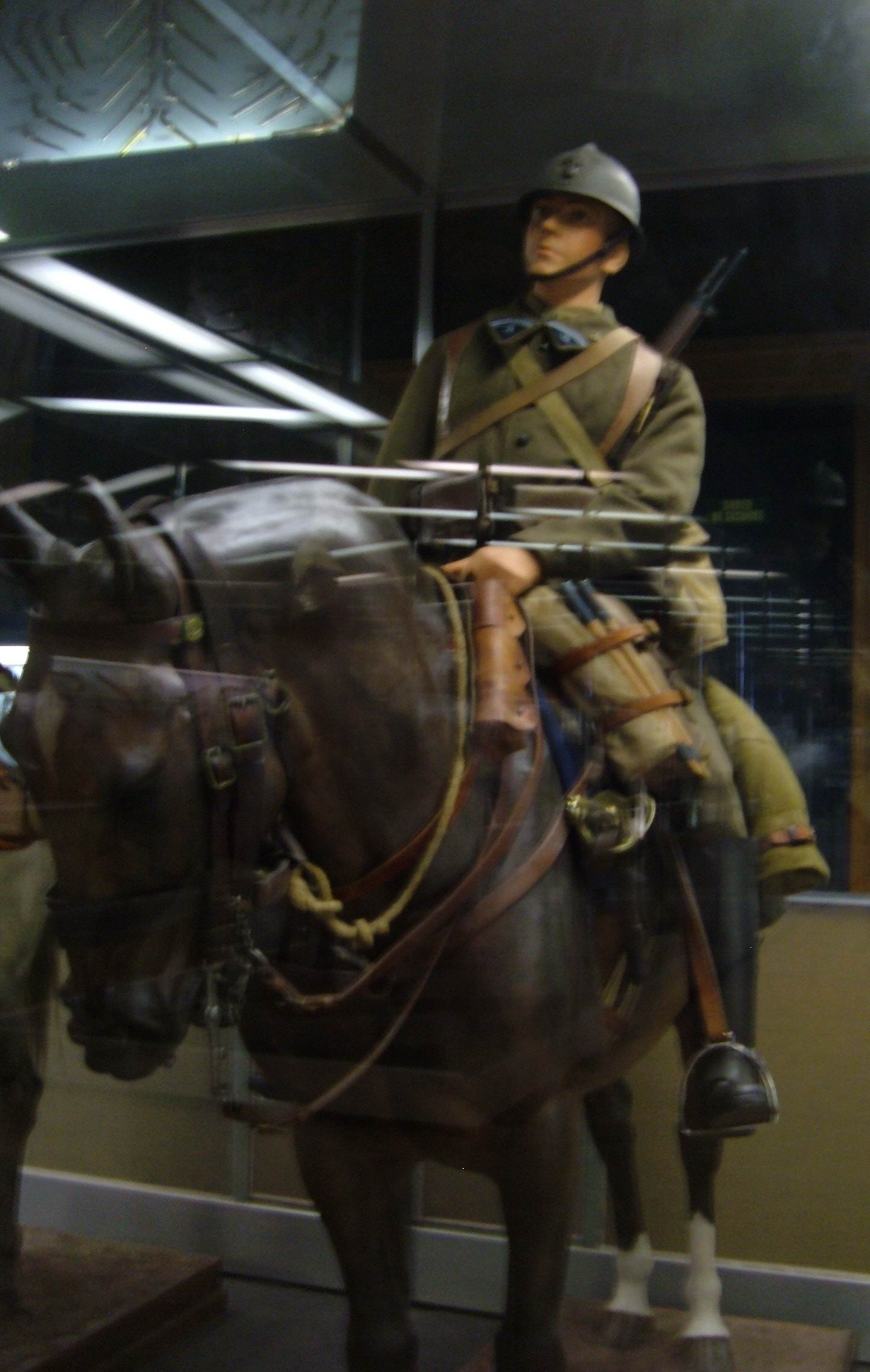 A 1939 French hussar on display at the Musée de l'Armée in Paris, France.